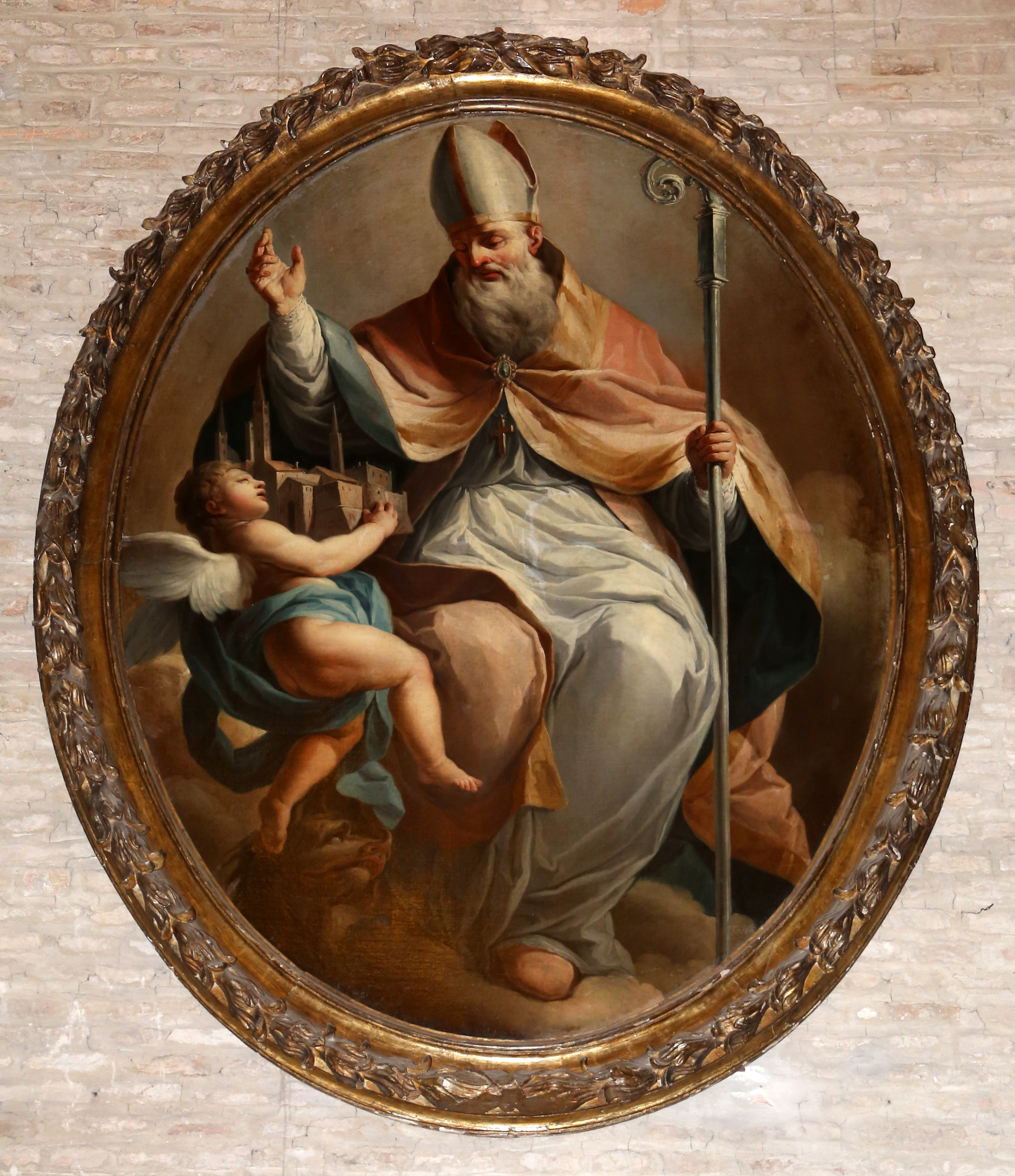 abbazia di San Mercuriale This is a photo of a monument which is part of cultural heritage of Italy.